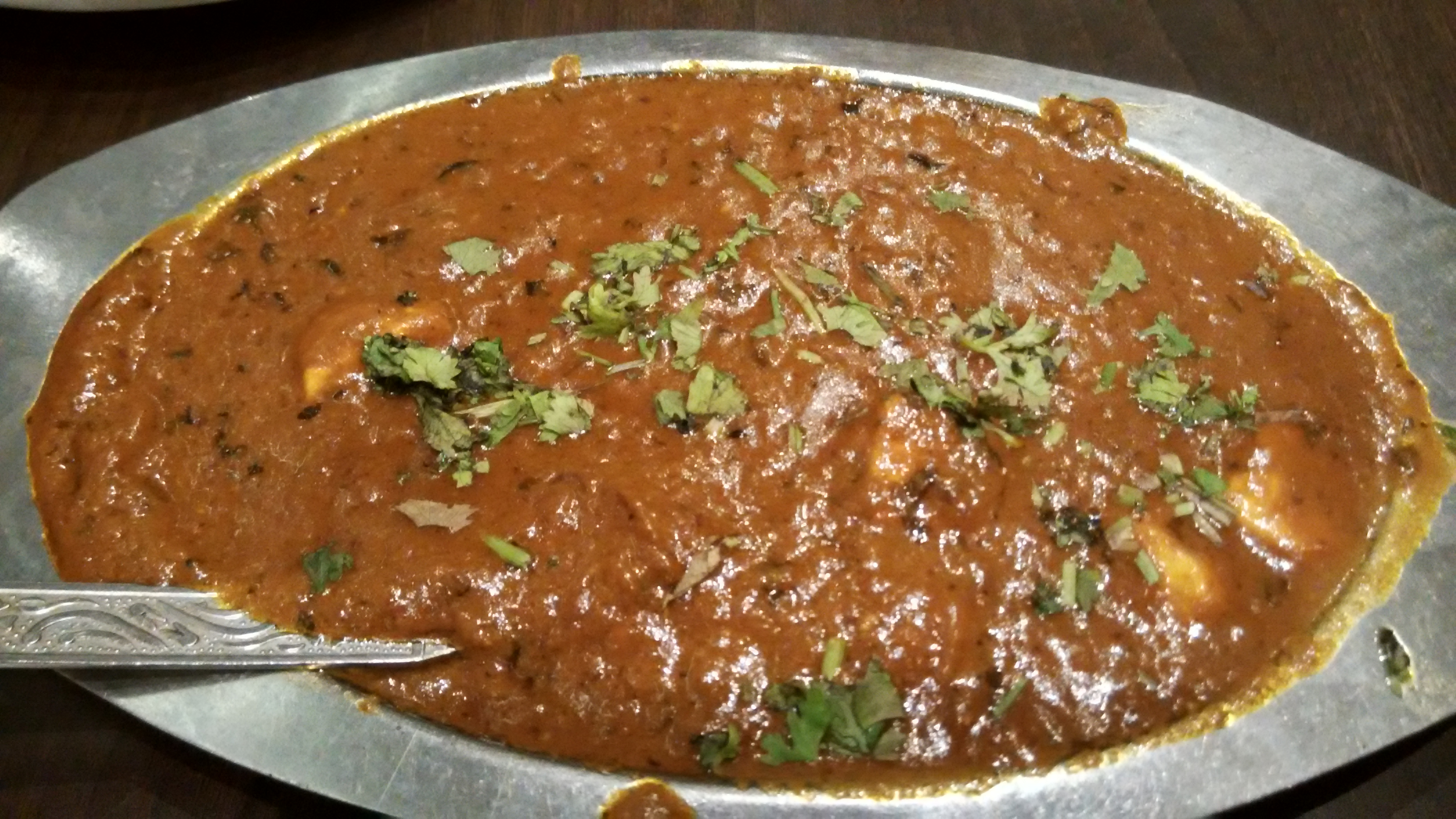 பன்னீர் வெண்ணெய் மசாலா.